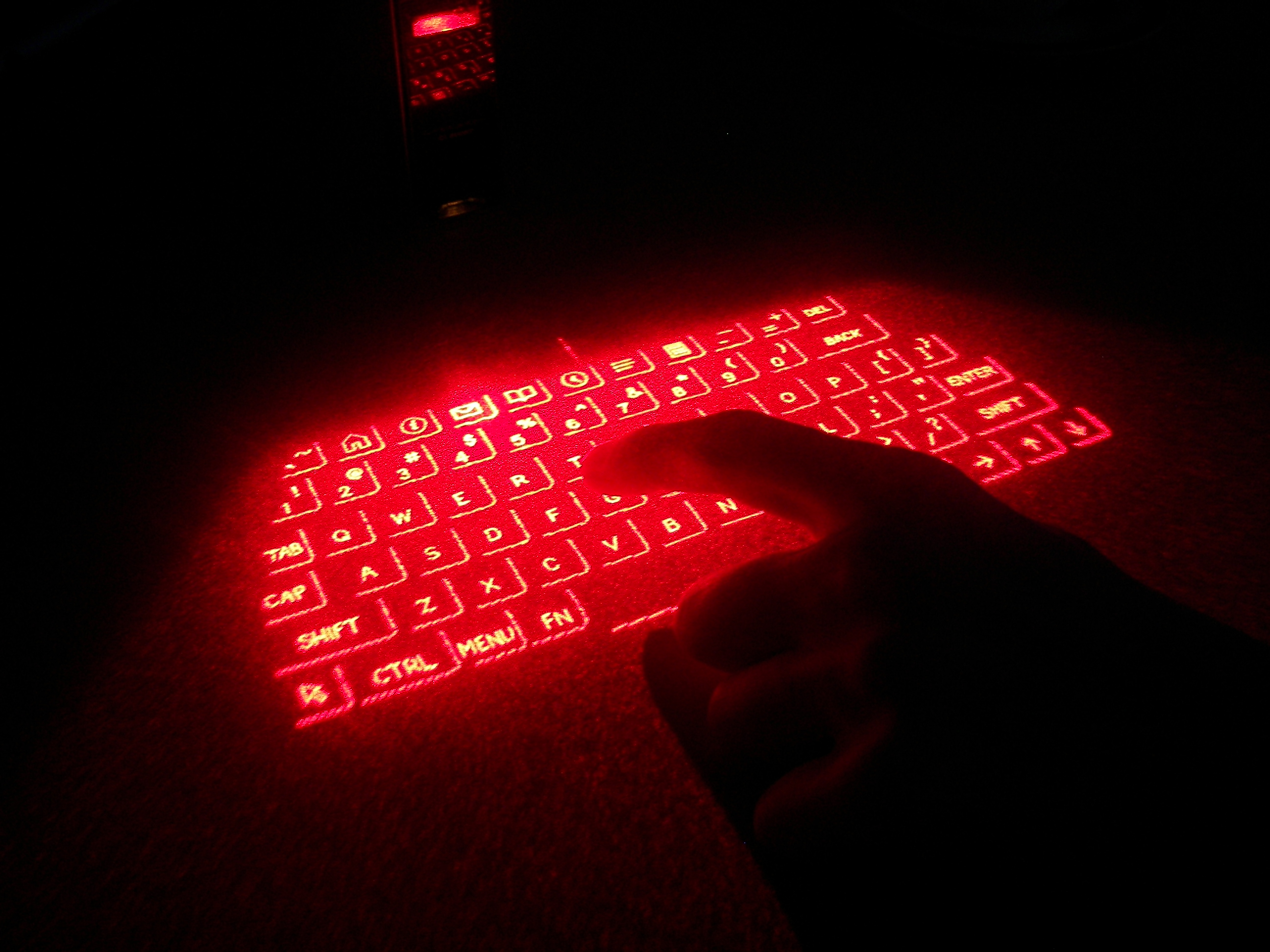 Wirtualna klawiatura Celluon Laserkey CL800BT podczas pracy. Zdjęcie wykonane 25 stycznia 2007 roku, autor: Piotr VaGla Waglowski